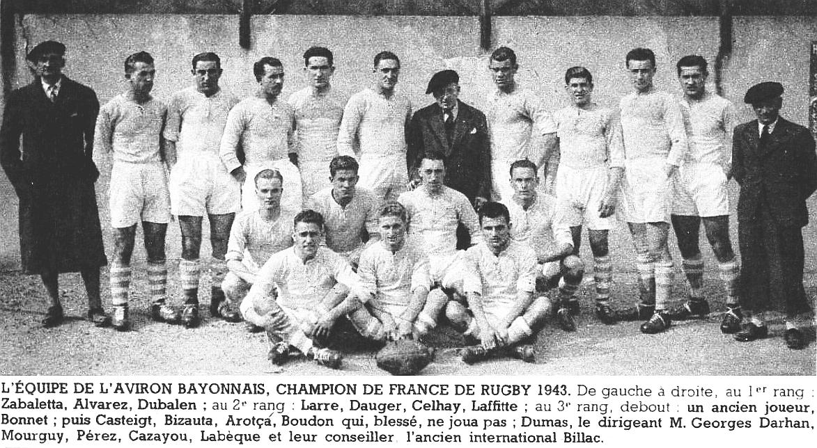 L'Aviron bayonnais champion de France de rugby en mars 1943.